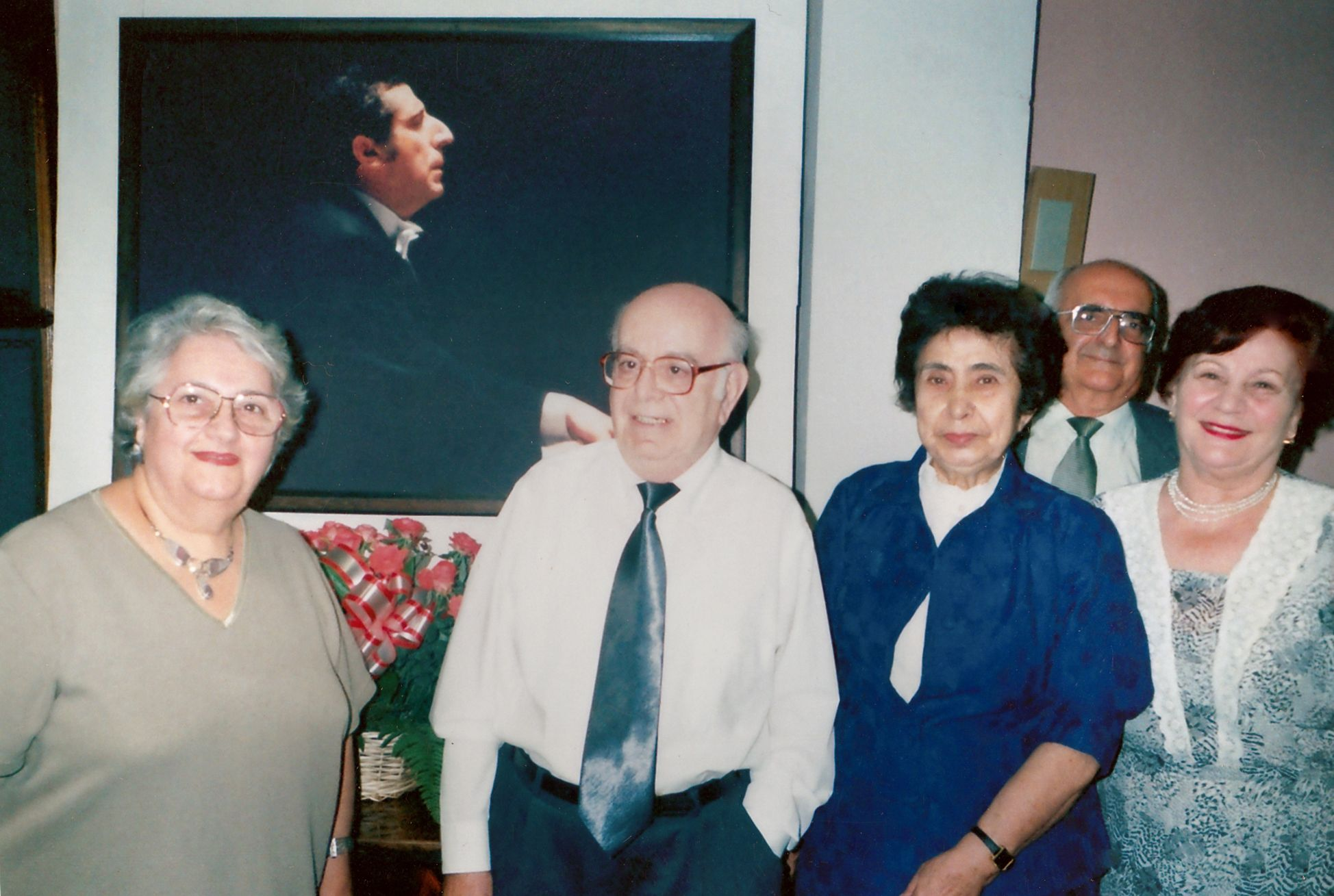 слева направо: музыковеды Алина Пахлеванян, Георгий Геодакян, Сусанна Аматуни, Армен Будагян и композитор Гегуни Читчян, 2001 год, Академия Наук Республики Армения. Конференция, посвященная 80-летию со дня рождения Арно Бабаджаняна